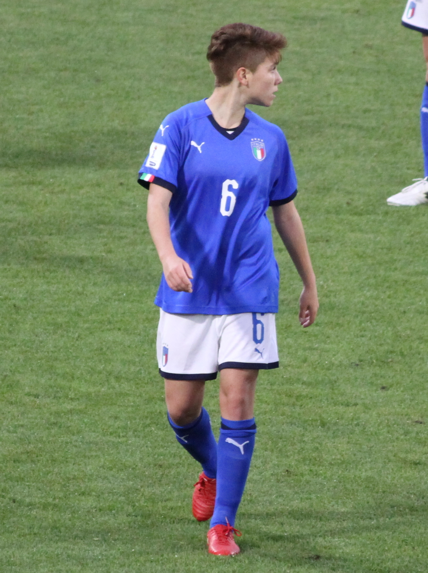 Manuela Giugliano, centrocampista della nazionale di calcio femminile dell'Italia, durante l'incontro Italia-Belgio del 10 aprile 2018 allo stadio Paolo Mazza di Ferrara.